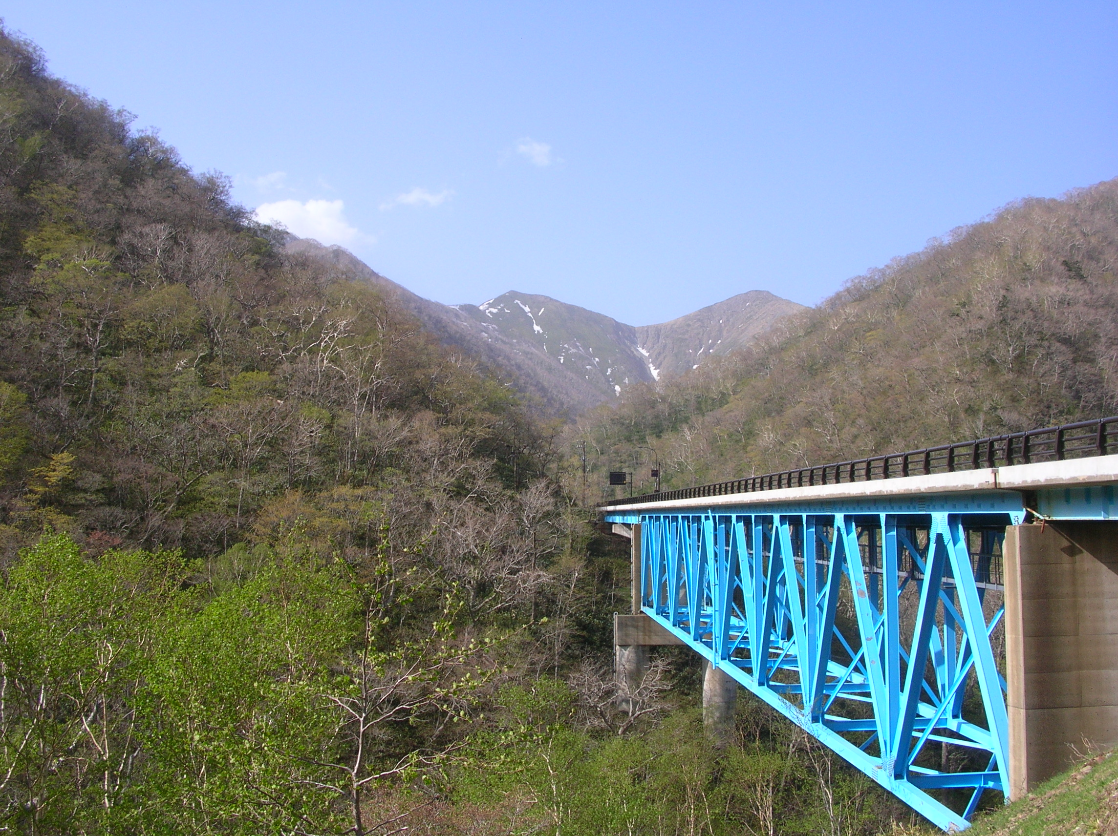 天馬街道に架かる橋